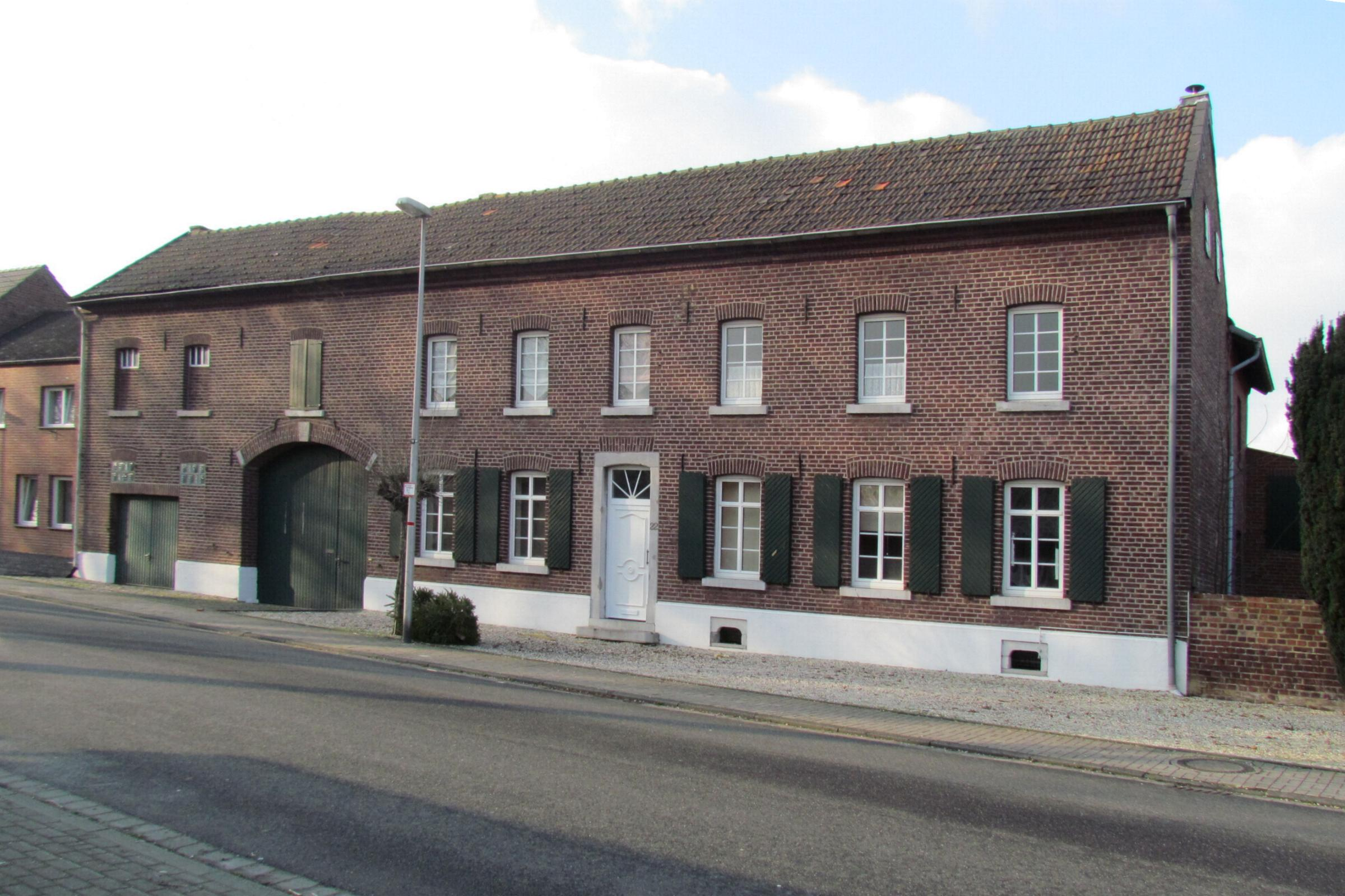 Baudenkmal in Gangelt